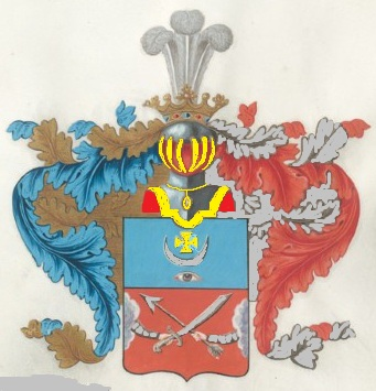 герб рода Окуневы. Разрисовано по рисунку из Общего гербовника Российской империи